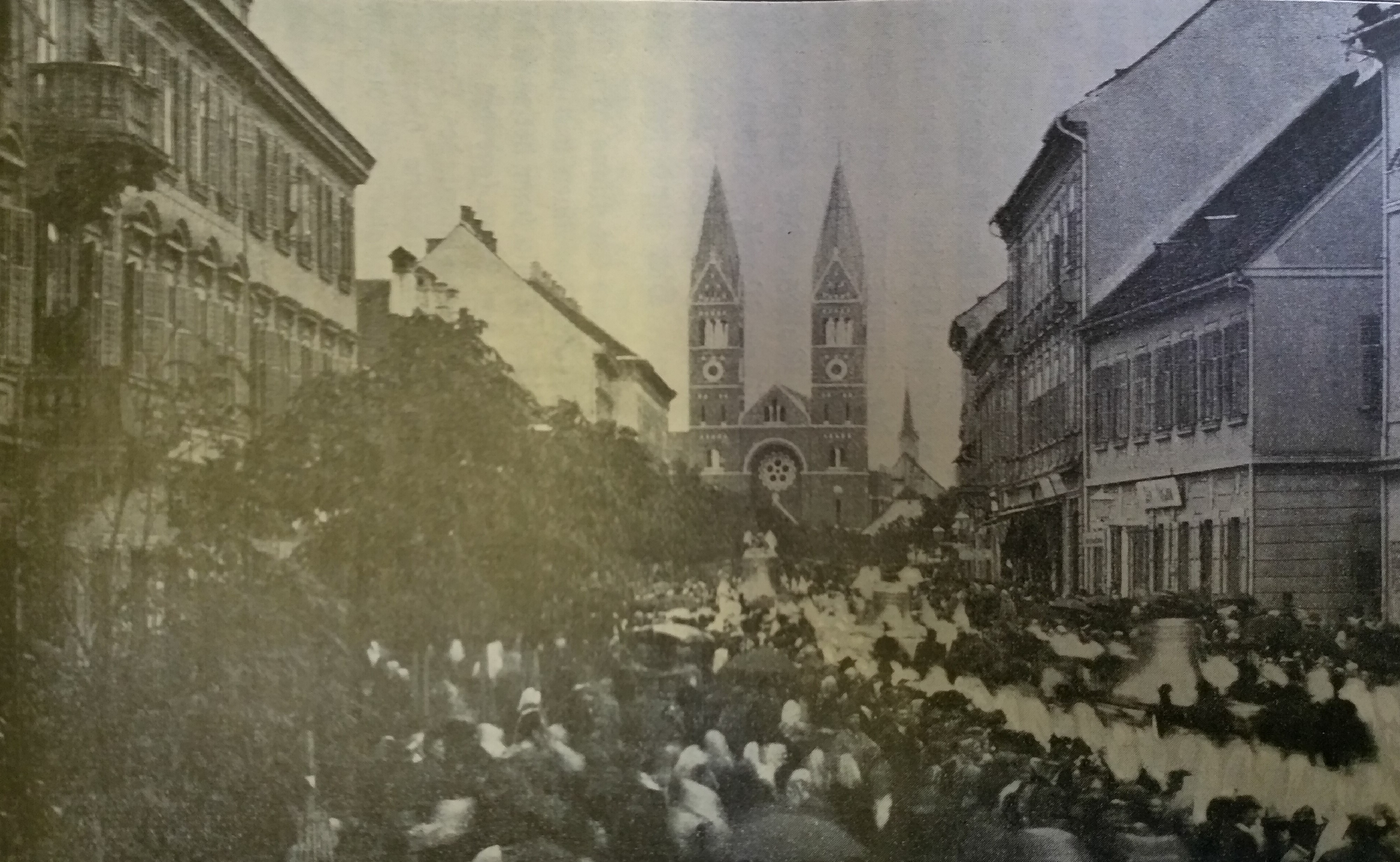 Prevoz zvonov v frančiškansko cerkev v Mariboru ob posvetitvi cerkve